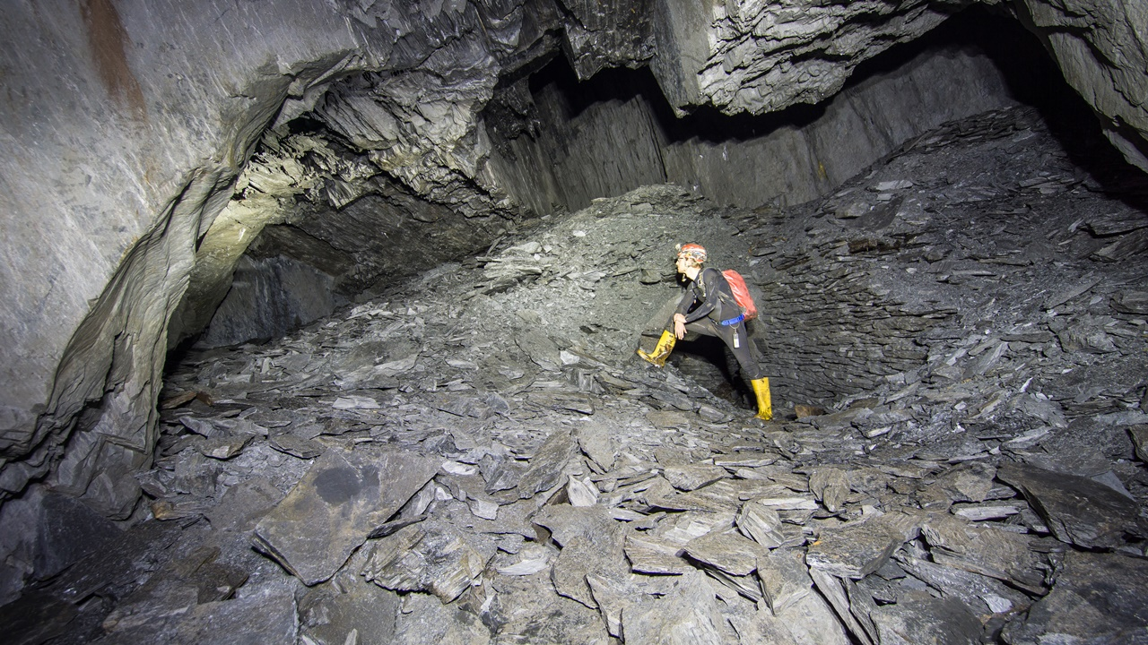 Schieferabbau Brachbach 2